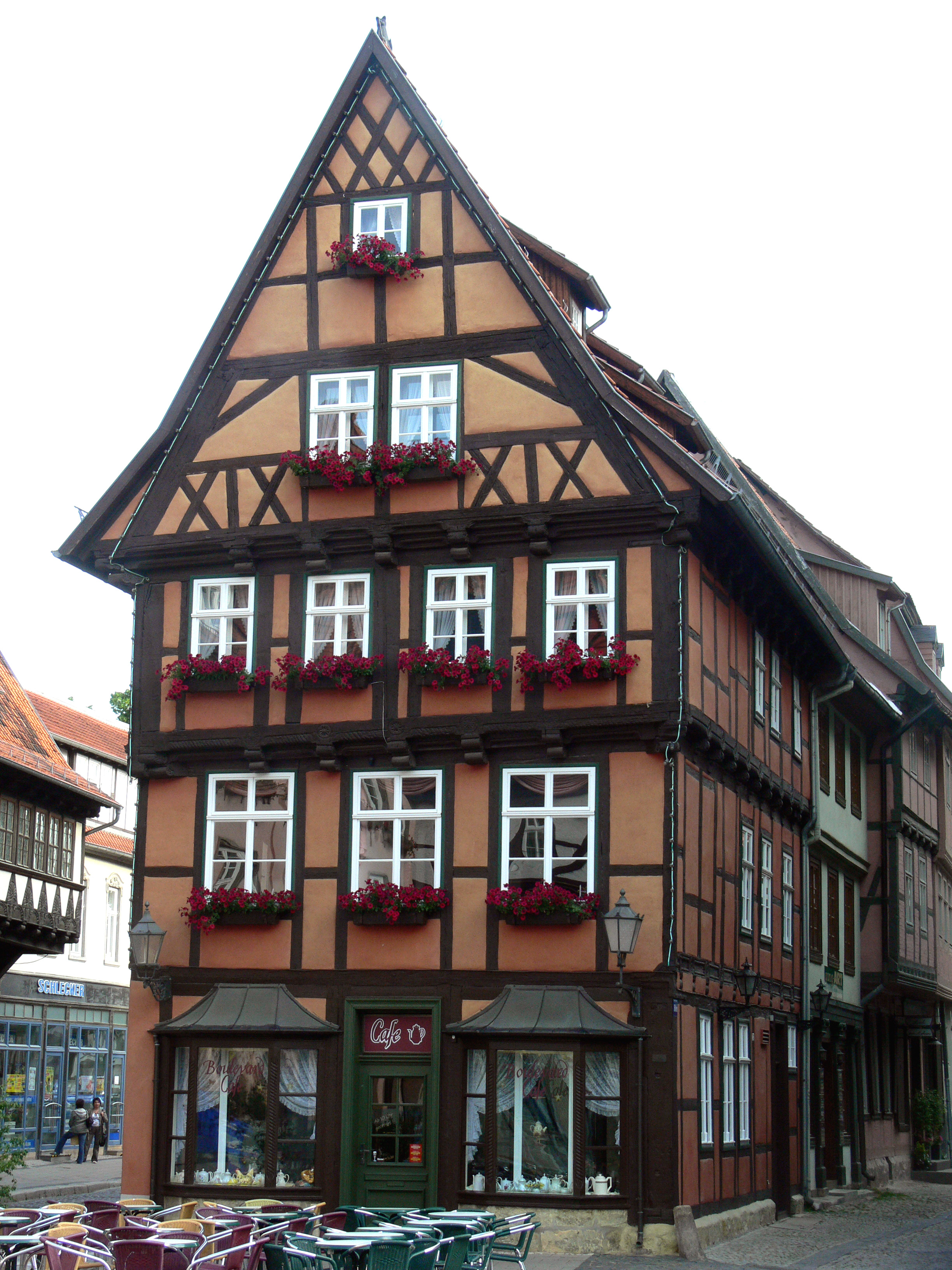 Fachwerkhaus in Quedlinburg. Carl-Ritter-Straße ?